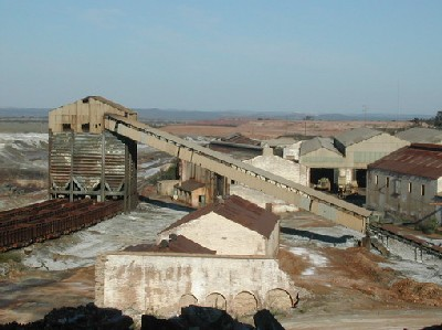 Zona de talleres, y la estación donde se cargaba el mineral hacia el muelle de Corrales en Huelva